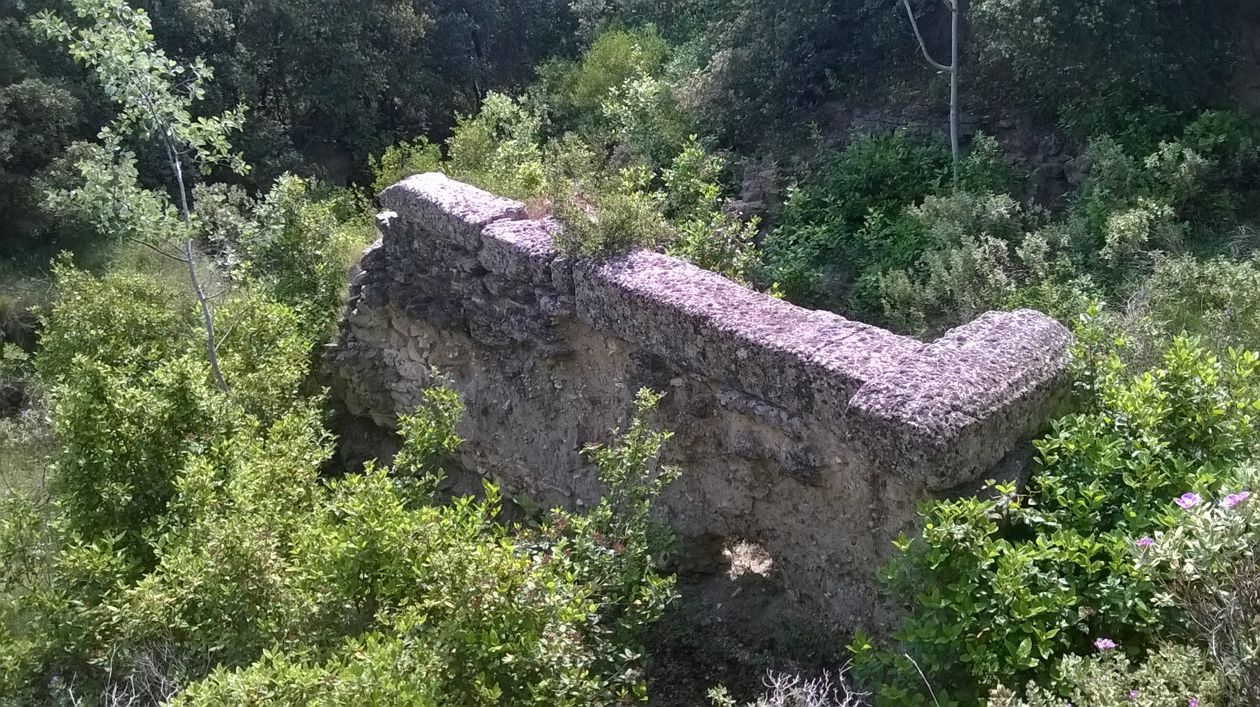 Prise par M. Thomy Mas